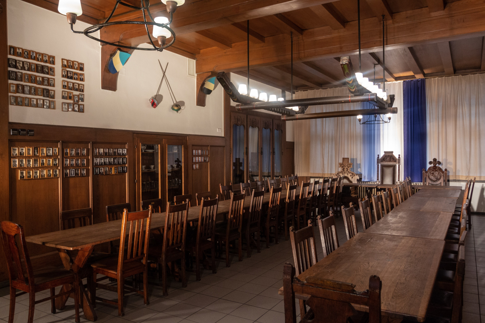 Главный зал дома корпуса Фризо-Керуския